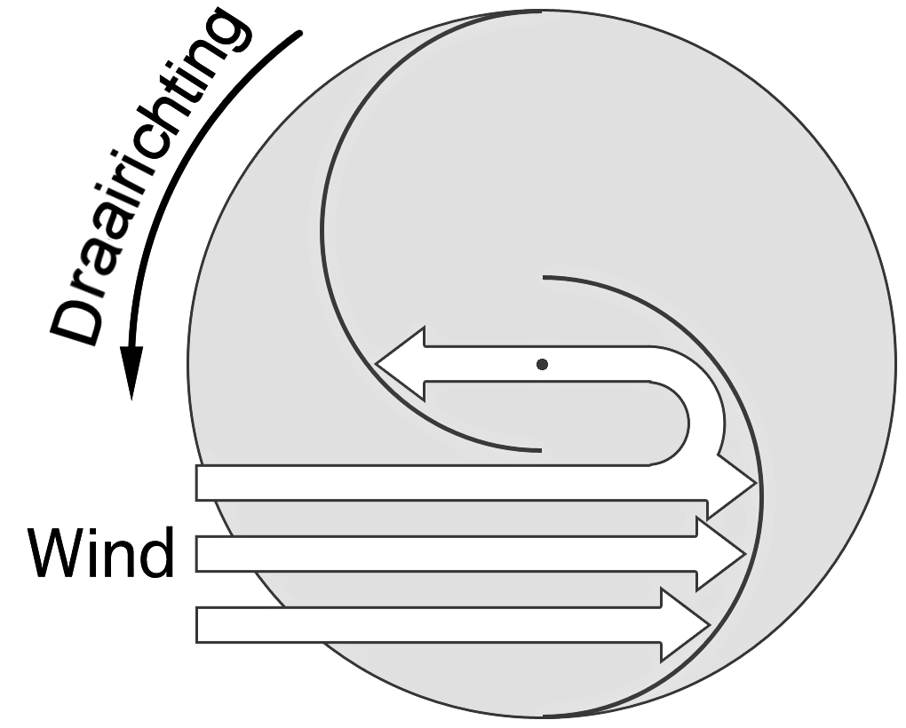 Savonius_Querschnitt Dutch txt